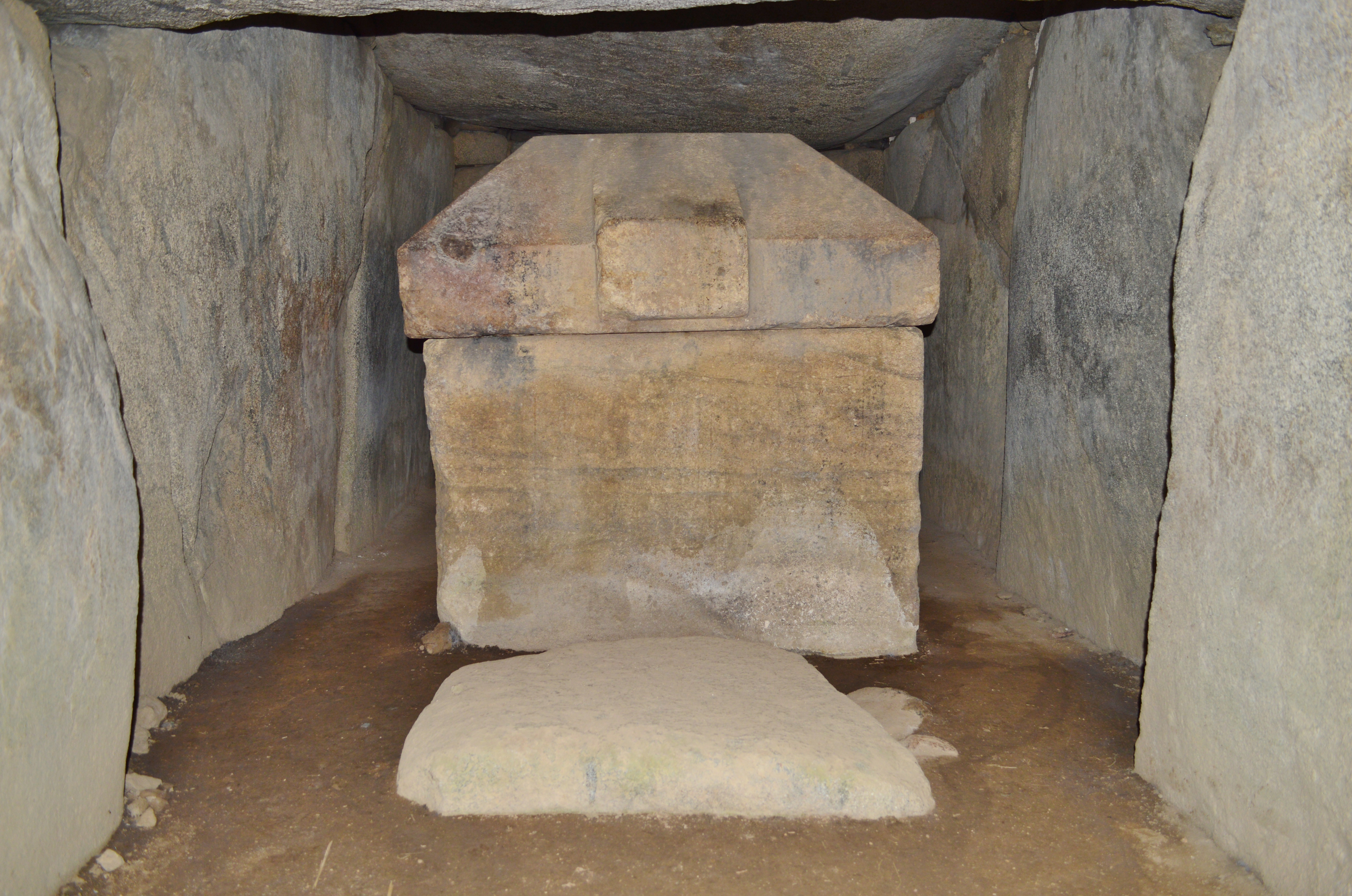 艸墓古墳 石室玄室